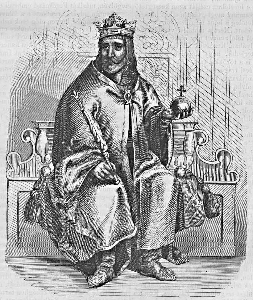 Szapolyai János magyar király (Vasárnapi Ujság, 1861. július 7.)